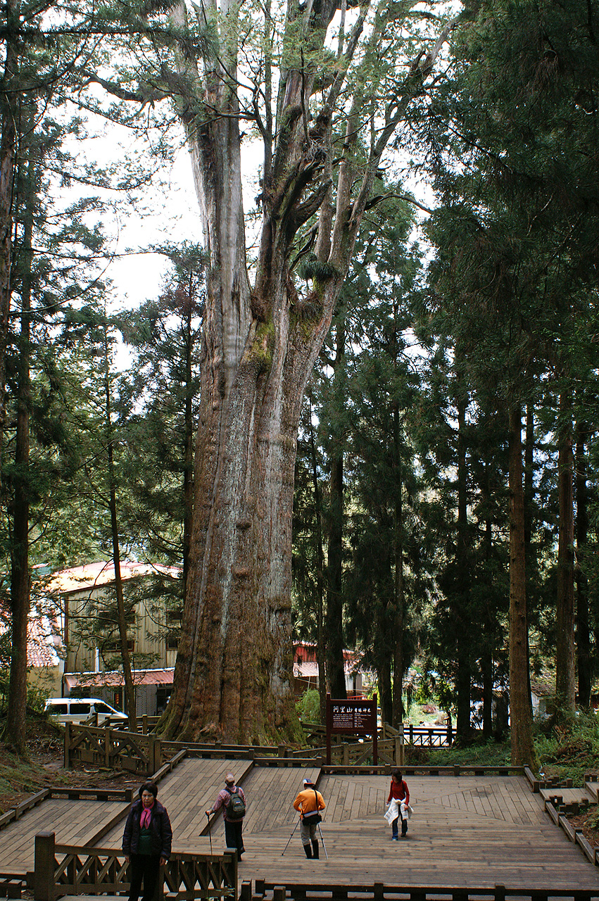 台灣紅檜(Chamaecyparis formosensis)。Bân-lâm-gú: siông-ngôo